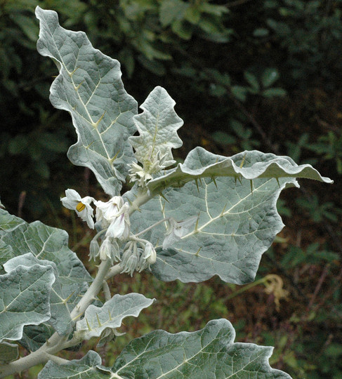 Solanum marginatum